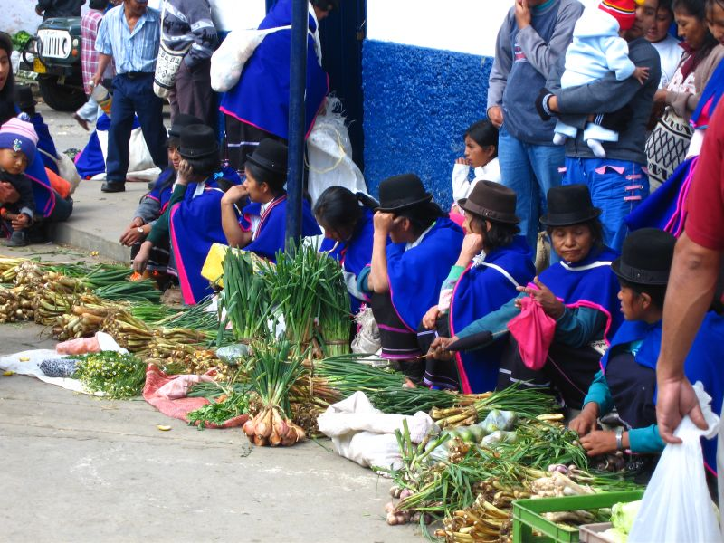 Indigenas paez, Colombia